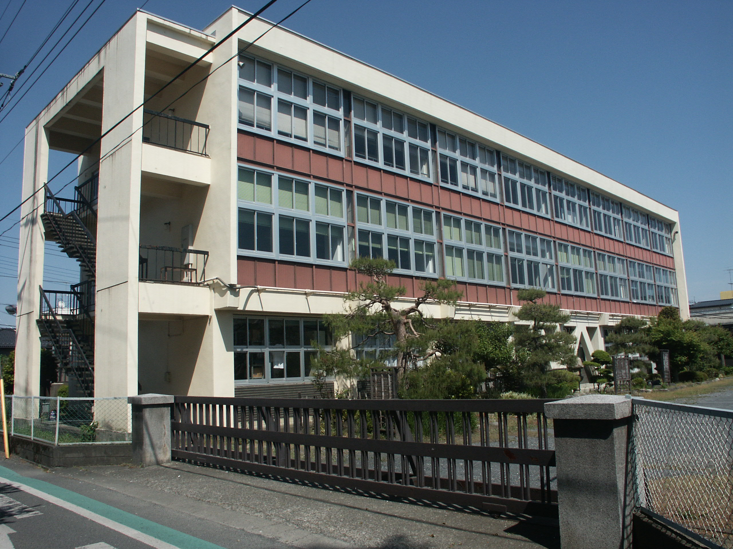 熊谷市に所在する埼玉県立熊谷高等技術専門校校舎